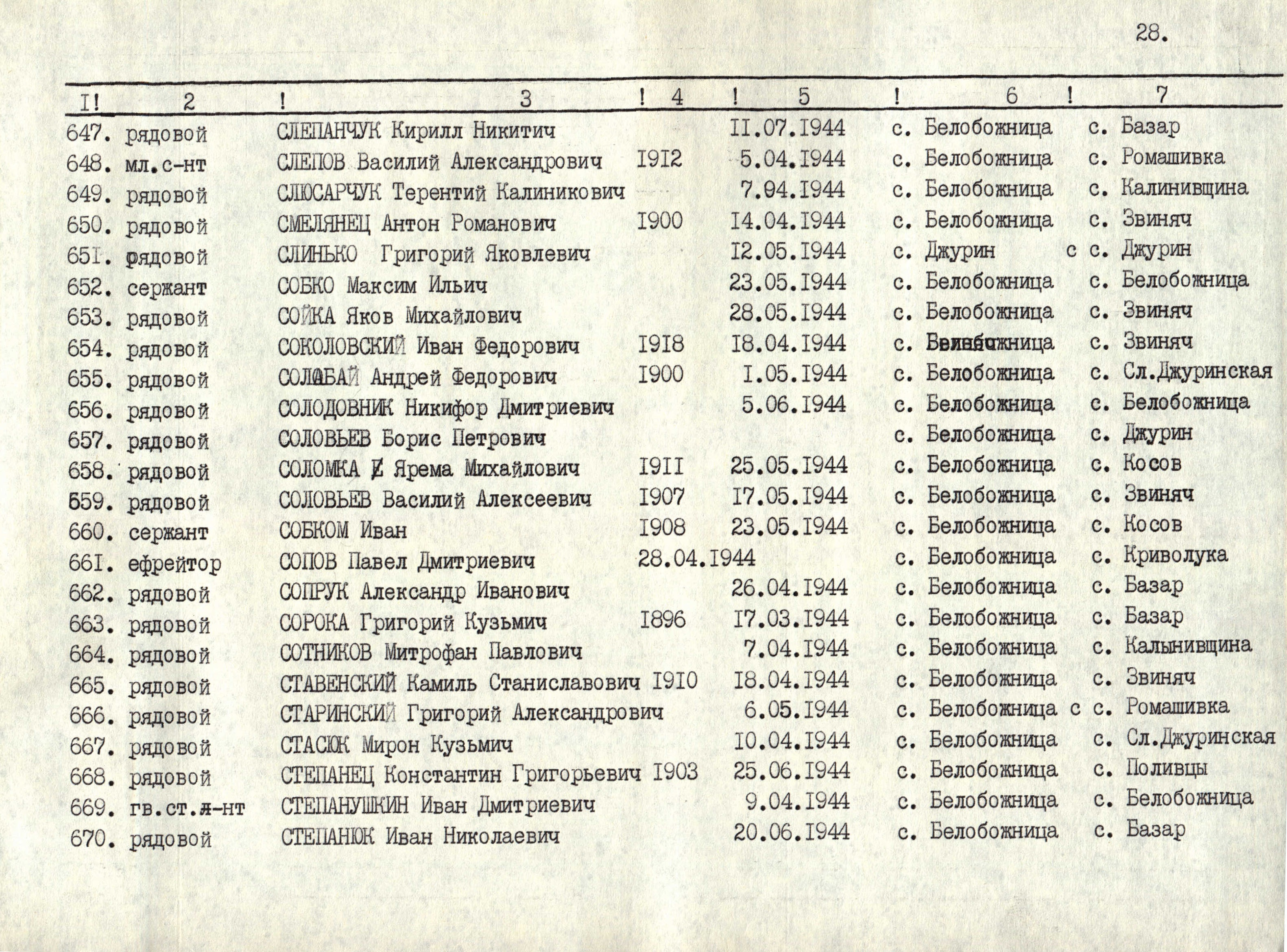 Герой Советского Союза